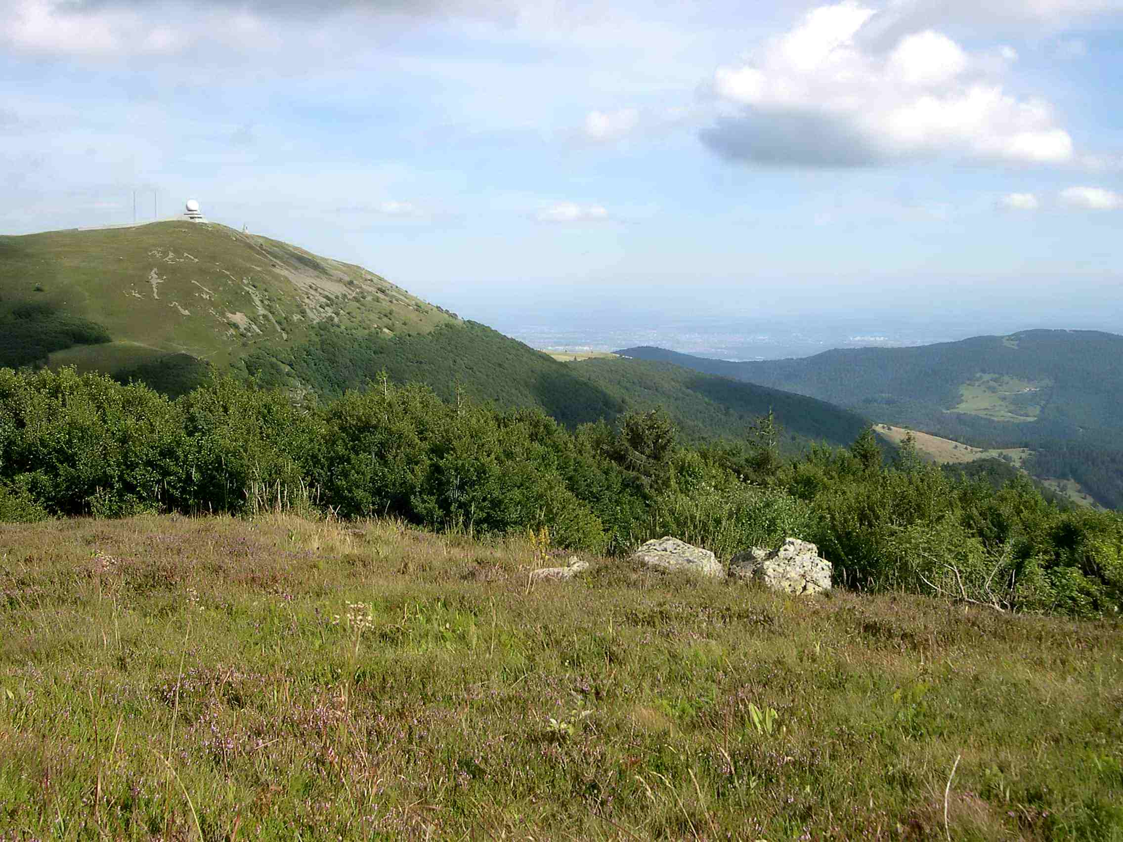 Vue sur une partie du massif des Vosges ( Grand Ballon) et la plaine d'Alsace, depuis le Storkenkopf 1366 m, 2 eme plus haut sommet de la Région Alsace.